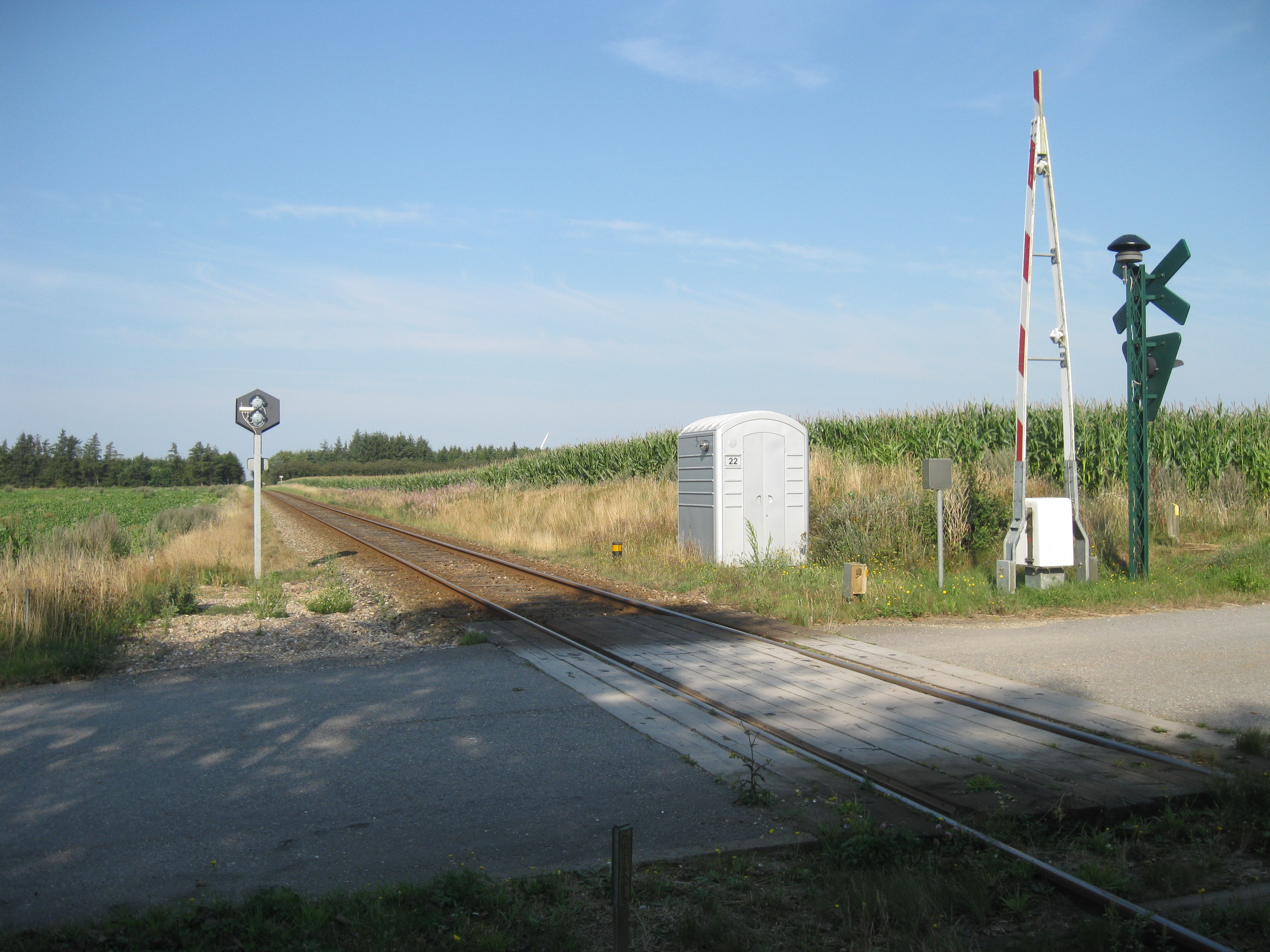 Det nedlagte trinbræt ved Elkærdam på Vestbanen